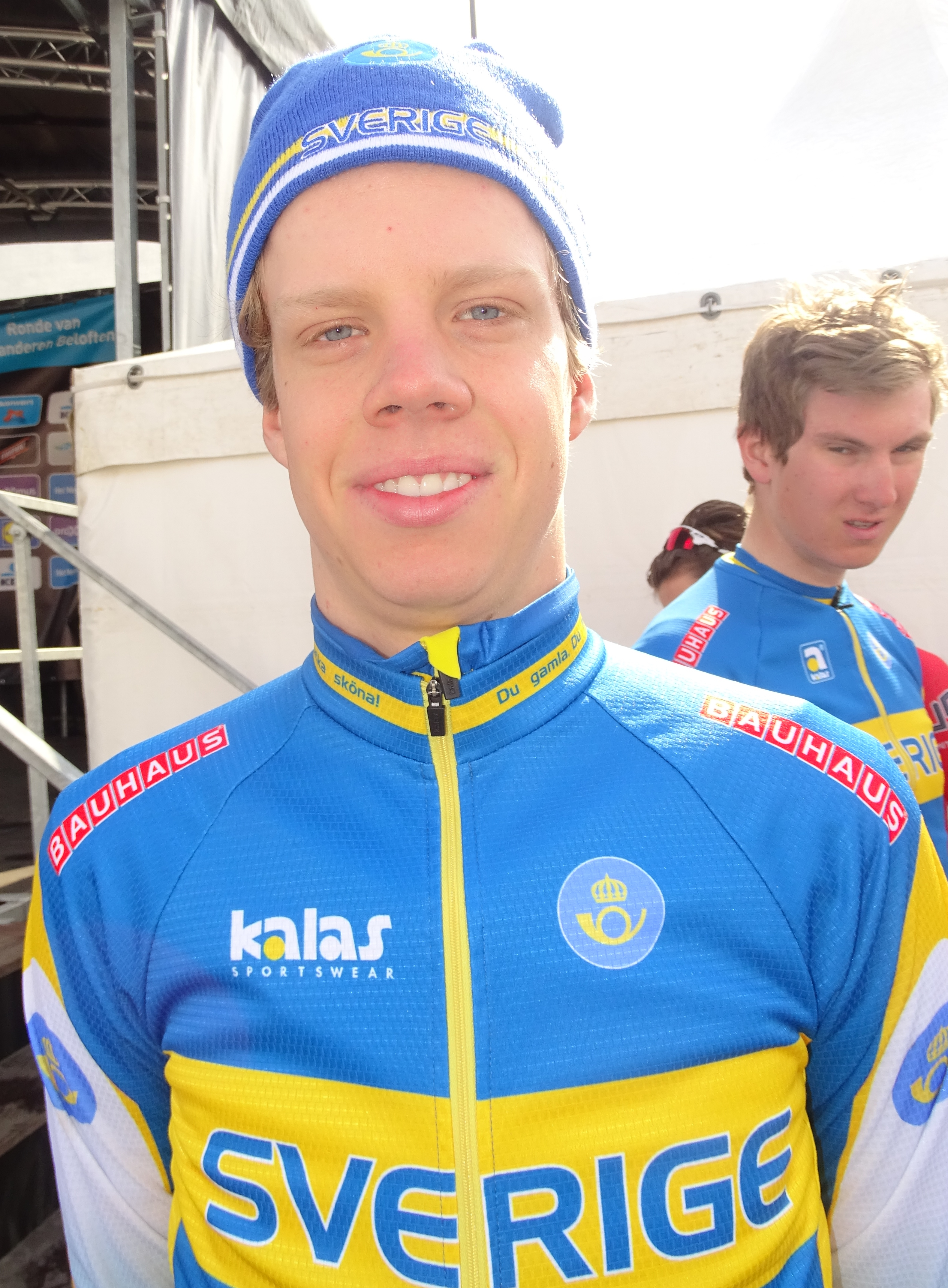 Reportage réalisé le samedi 11 avril à l'occasion du départ et de l'arrivée du Tour des Flandres espoirs 2015 à Audenarde, Belgique.